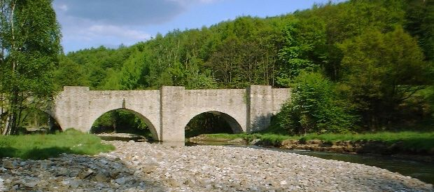 Freiberger Mulde mit Altväterbrücke nördlich von Freiberg